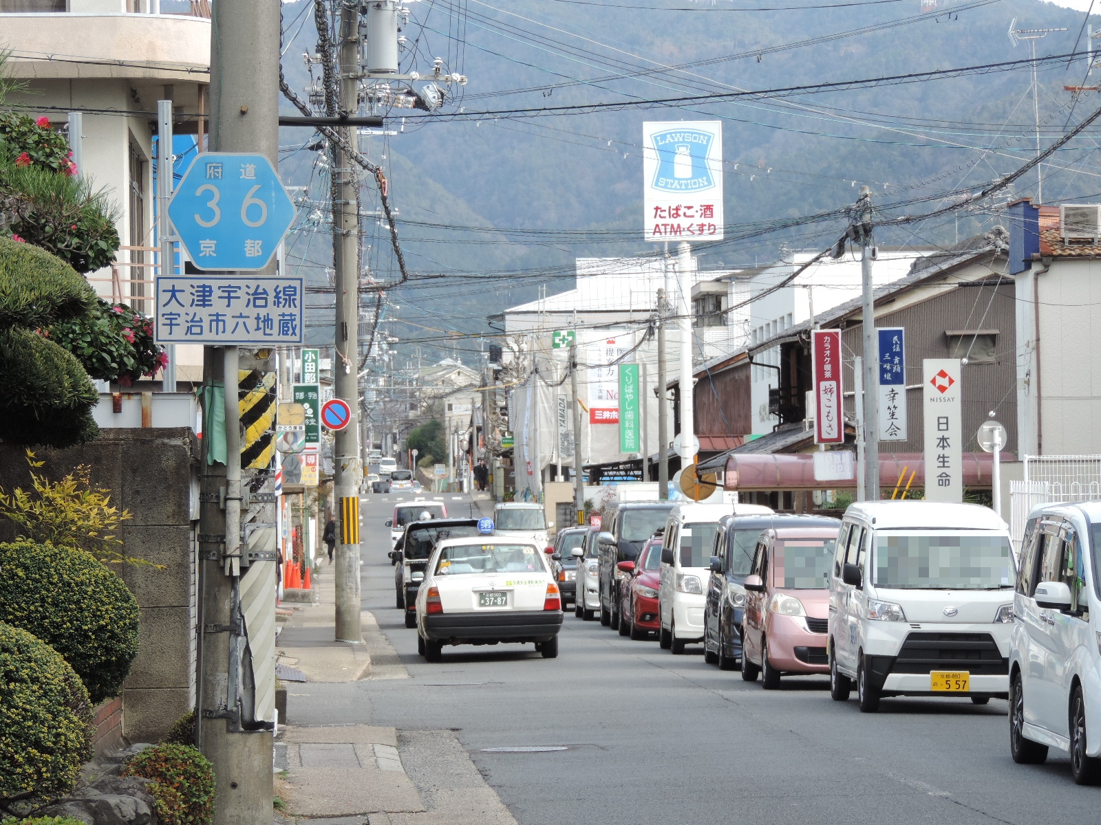 京都府宇治市六地蔵のja:滋賀県道・京都府道36号大津宇治線（2020年撮影）